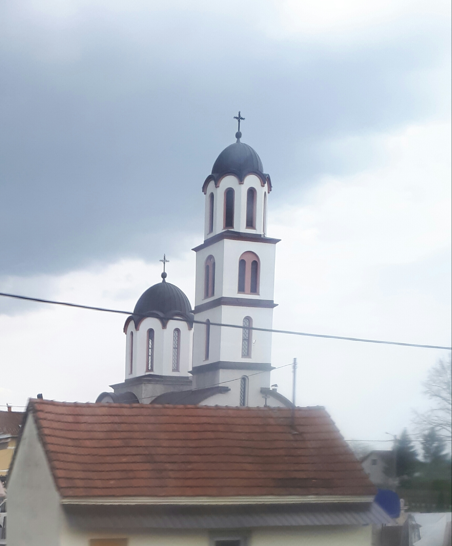 Die Serbisch-orthodoxe Kirche Hl. Apostel Peter und Paul im Dorf Dubrave, Gemeinde Gradiška, Republika Srpska, Bosnien und Herzegowina. Српски (ћирилица): Српска православна црква Св. Апостола Петра и Павла у селу Дубраве, општина Градишка, Република Српска, Босна и Херцеговина.